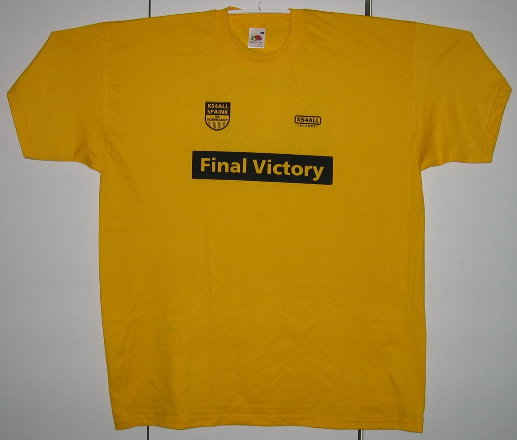 T-shirt dat door XS4ALL gratis weggegeven werd aan z'n abonnees ter gelegenheid van het winnen van de rechtszaak tegen Scientology.